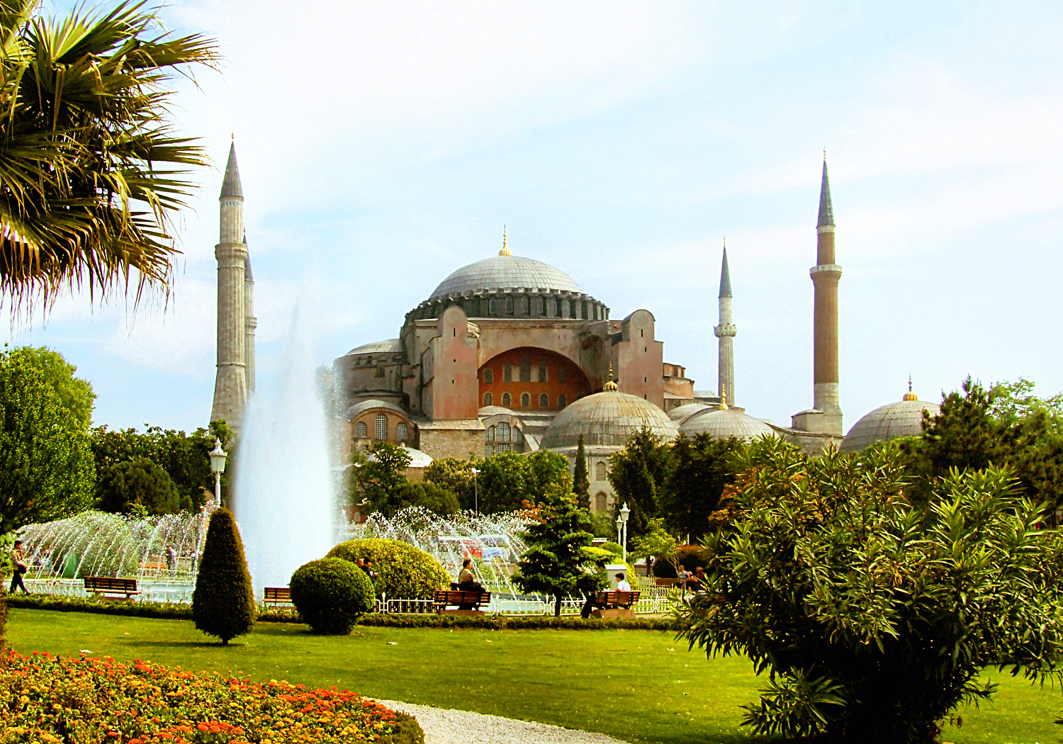 Stambuł, Hagia Sofia (Aya Sofya); Istambul, Hagia Sophia